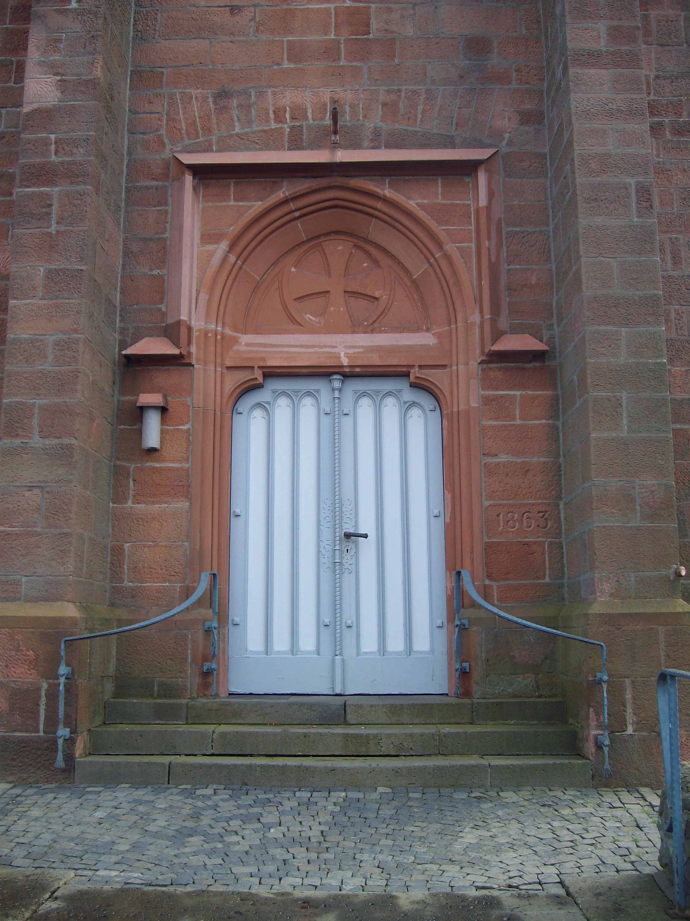 Evangelische Kirche Kinzenbach, Heuchelheim, Hessen, Deutschland